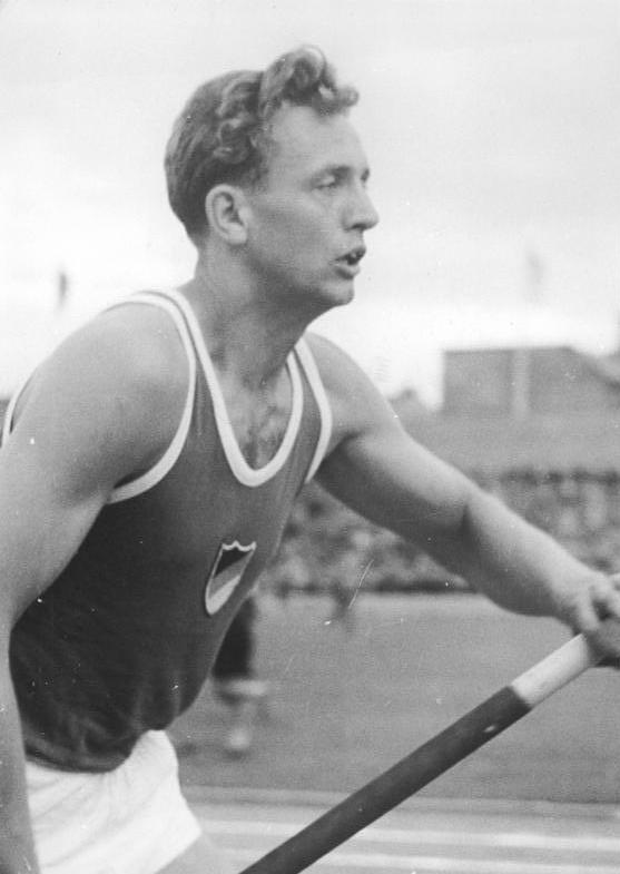 Randolf Peukert Zentralbild Beyer Bey 28.7.1955 Abendsportfest der Leichtathleten Am Mittwoch, dem 27. Juli 1955 fand im Berliner Walter-Ulbricht-Stadion ein Abendsportfest der Leichtathleten statt. An dieser Veranstaltung nahmen in erster Linie die Sportfreunde teil, die unsere Republik bei den V. Weltfestspielen der Jugend in Warschau vertreten werden. UBz: Einer der begabtesten deutschen Stabhochspringer ist Randolf Peukert, der eine Höhe von 4,10 m bewältigte. Peukert (Chemie Halle-Leuna) war mit 4,28 m kurze Zeit deutscher Rekordhalter in dieser Disziplin.